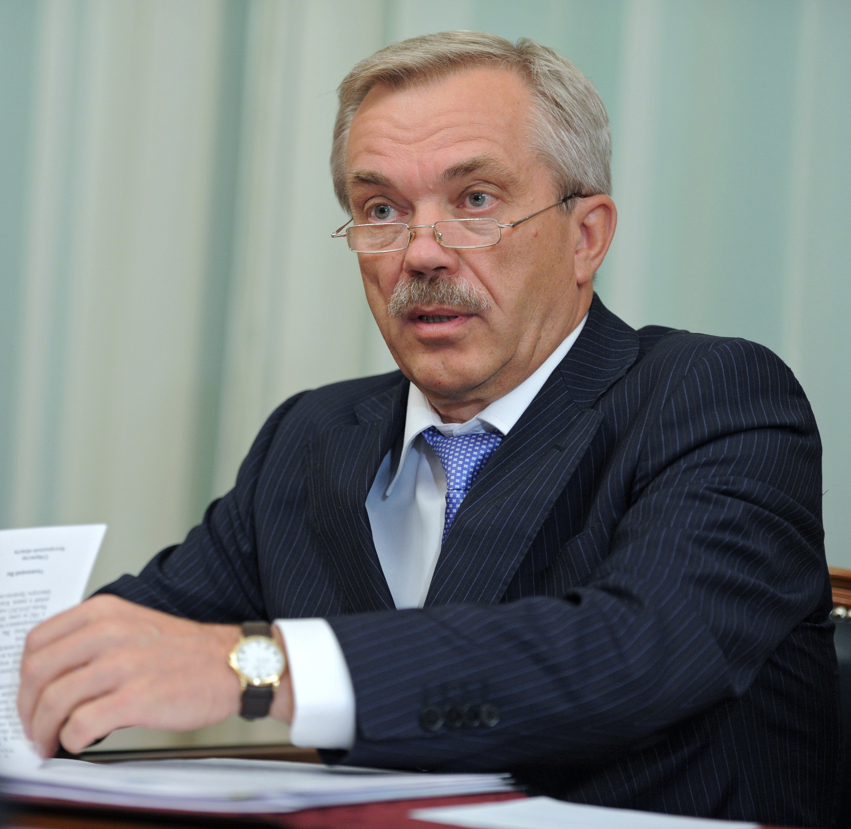 Губернатор Белгородской области Е. С. Савченко на встрече с Председателем Правительства Российской Федерации В. В. Путиным